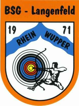 Wappen / Logo der Bogensportgilde Rhein-Wupper e.V.